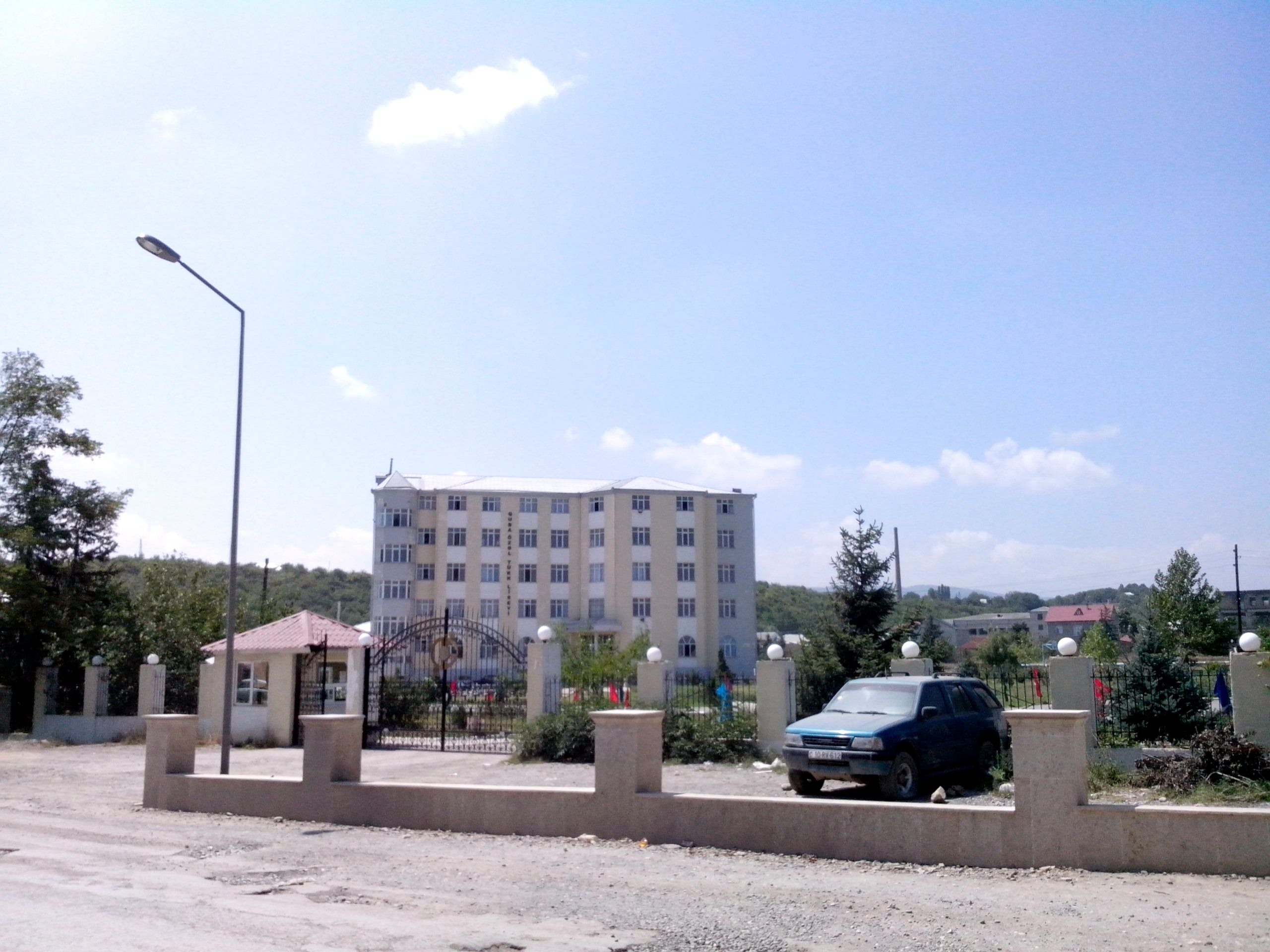 Quba Özəl Türk Liseyi